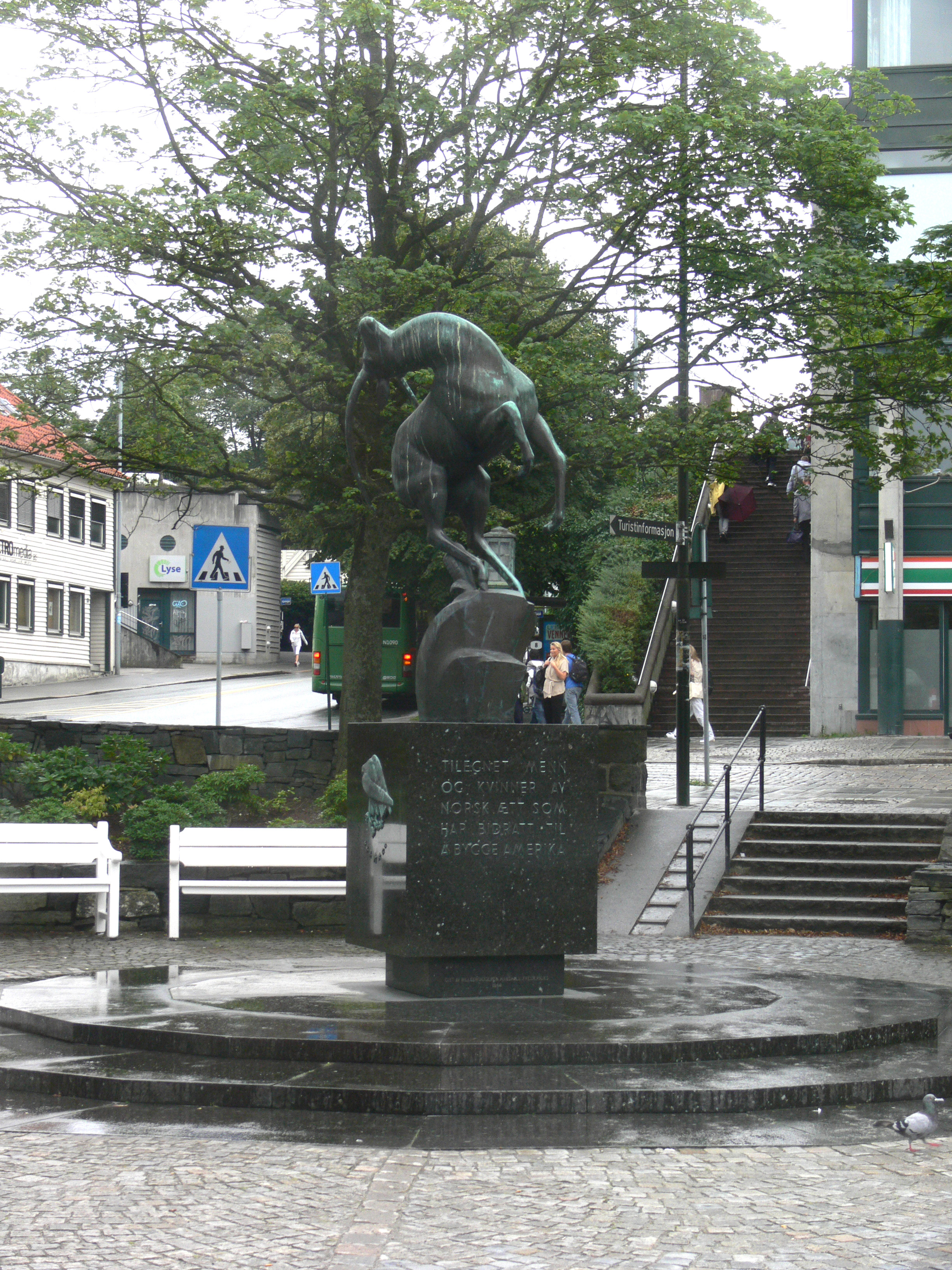 Denkmal für die norwegischen Auswanderer, die am Aufbau Amerikas beteiligt waren, in Stavanger